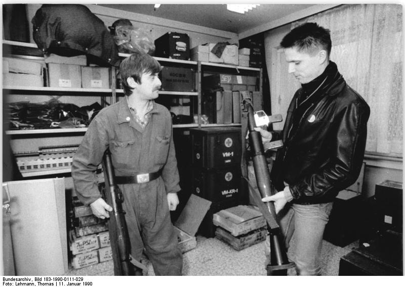 ADN-ZB-Lehmann-11.1.1990-Berlin: Entwaffnung AfNS Mit der Entwaffnung des ehemaligen Amtes für Nationale Sicherheit wurde in der Dienststelle Normannenstraße begonnen. In einer Waffenkammer der ehemaligen Grenzstelle überprüft VP-Obermeister Ronald Hösslbarth (l.) den Bestand. Er wird unterstützt von Andreas Schulze, Mitglied der Grünen Partei und Vertreter am zentralen Runden Tisch. Nach der Überprüfung werden die Bestände registriert und in VP-Verwaltung genommen.